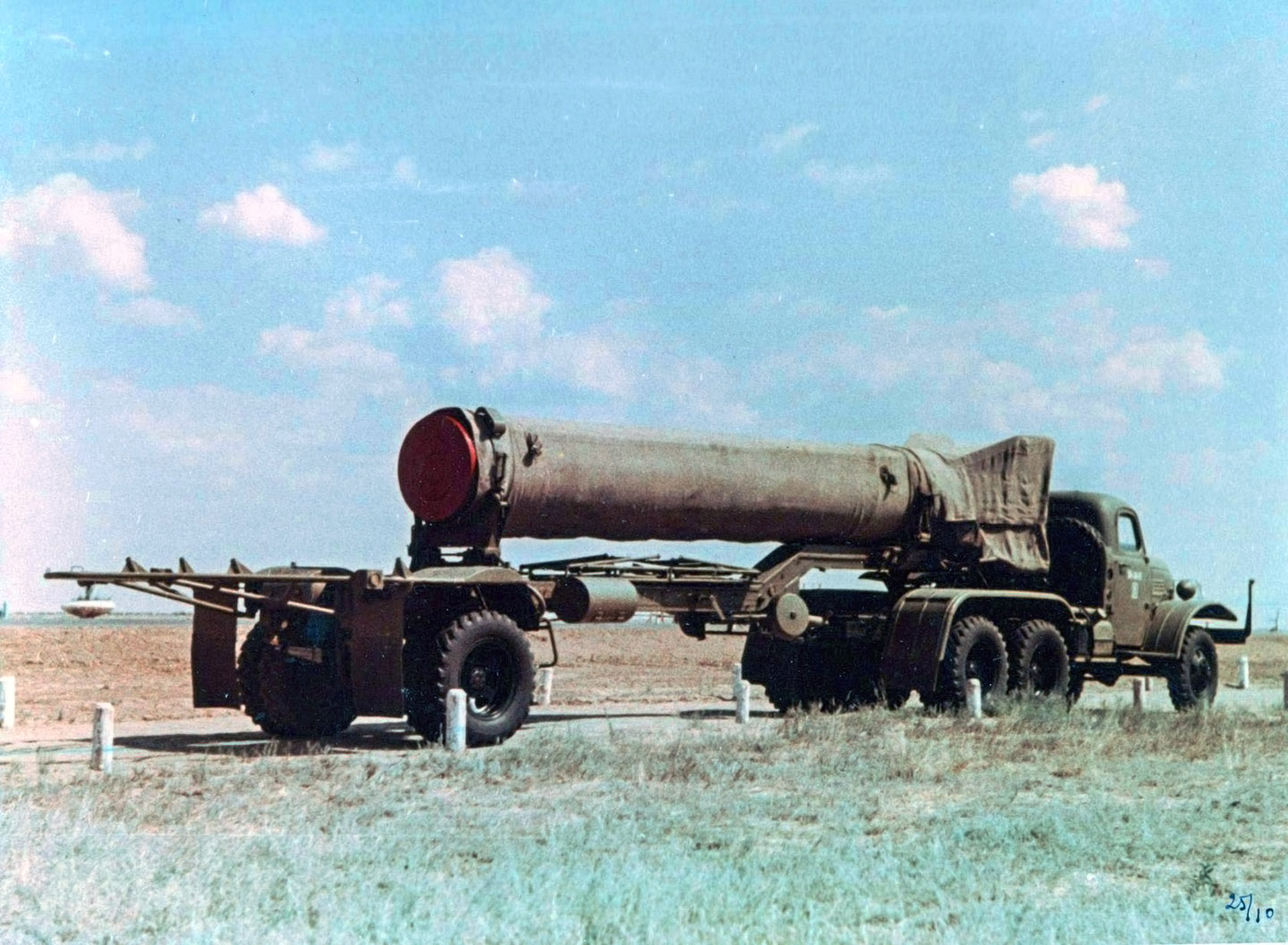 Р-11 — жидкостная баллистическая ракета на высококипящих компонентах топлива. Ракета Р-11 в походном положении.